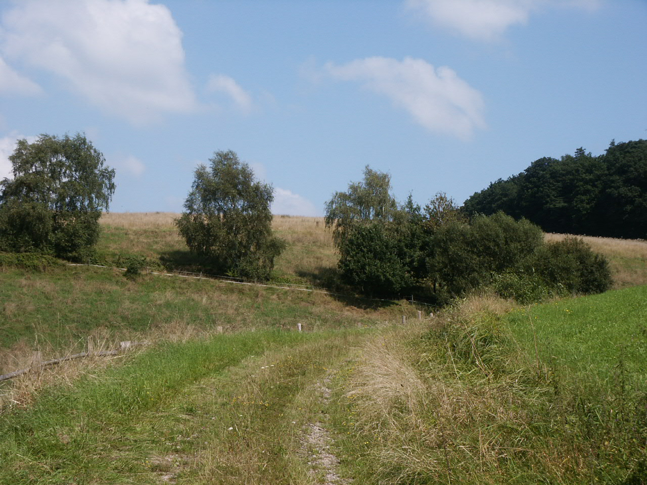 Wandern um Heenes